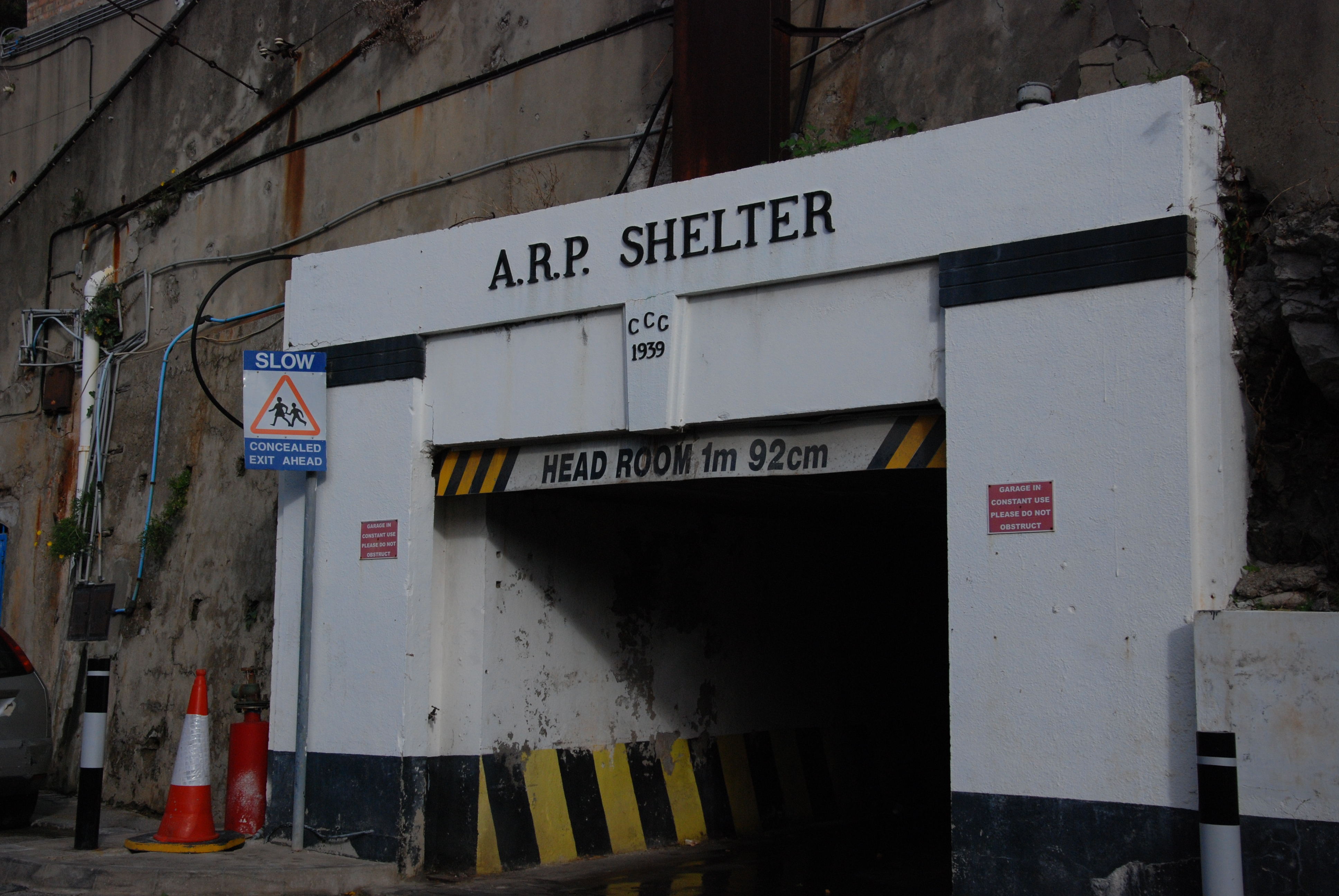 A.R.P Shelter, Gibraltar